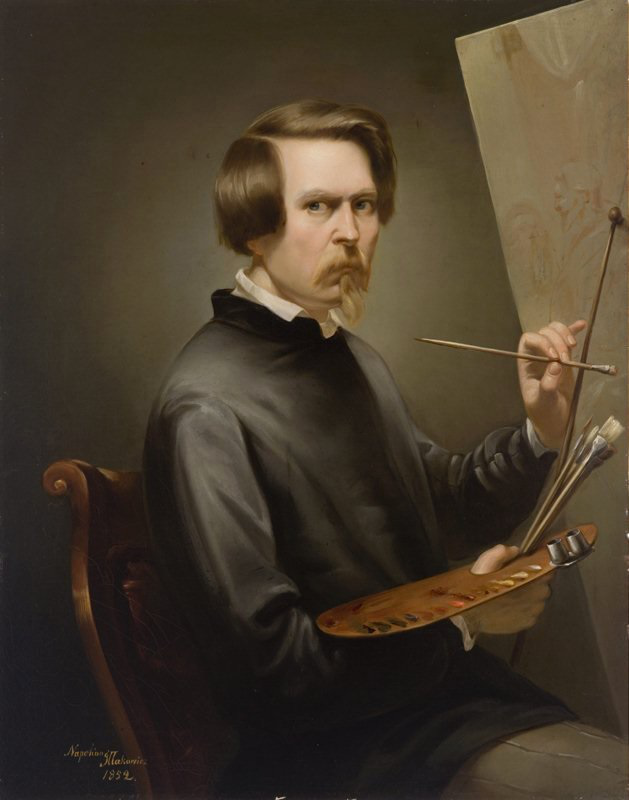 Self-portrait